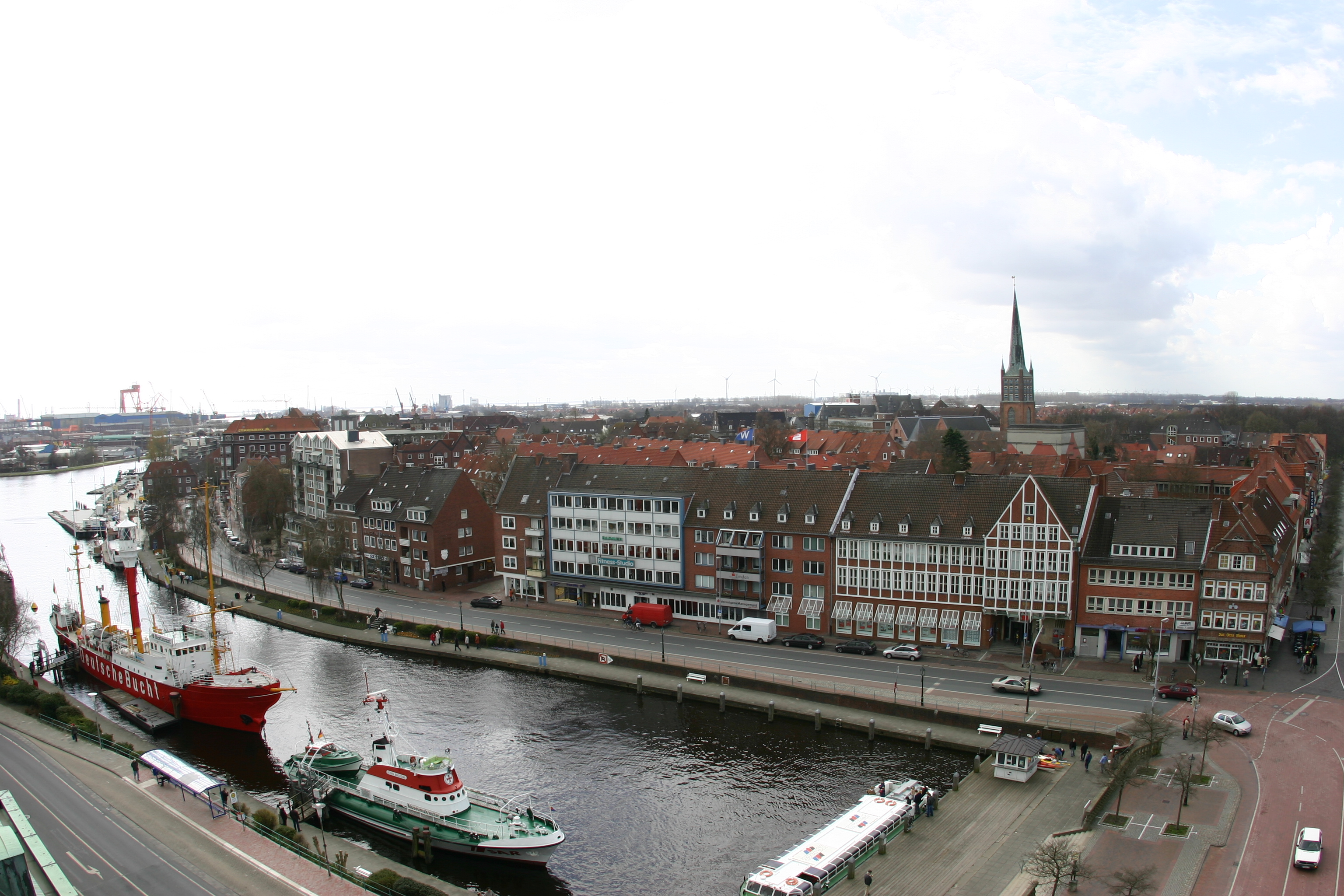 Bildbeschreibung: Blick vom Rathausturm auf den Ratsdelft, den historischen Teil des Hafens von Emden, Ostfriesland, Niedersachsen (mit Museumsschiffen) Fotograf/Zeichner: Emder Muschelschubser Datum: 12.05.2006